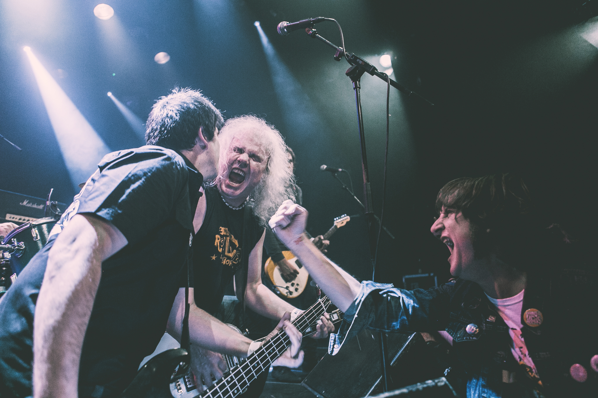 Señor No, Intxaurrondo kultur etxean, 2017ko azaroaren 18an.